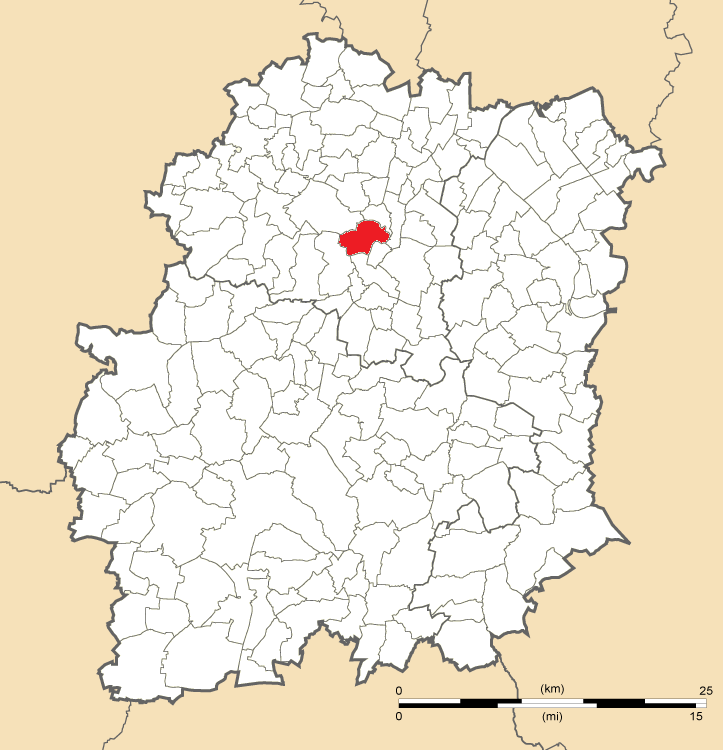 Carte de position de Linas en Essonne (91)